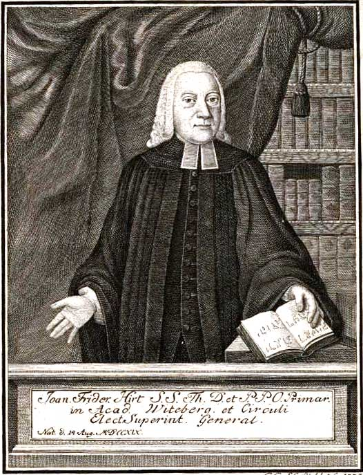 Kupferstich - Johann Friedrich Hirt (1719-1783), war ein deutscher lutherischer Theologe und Orientalist.